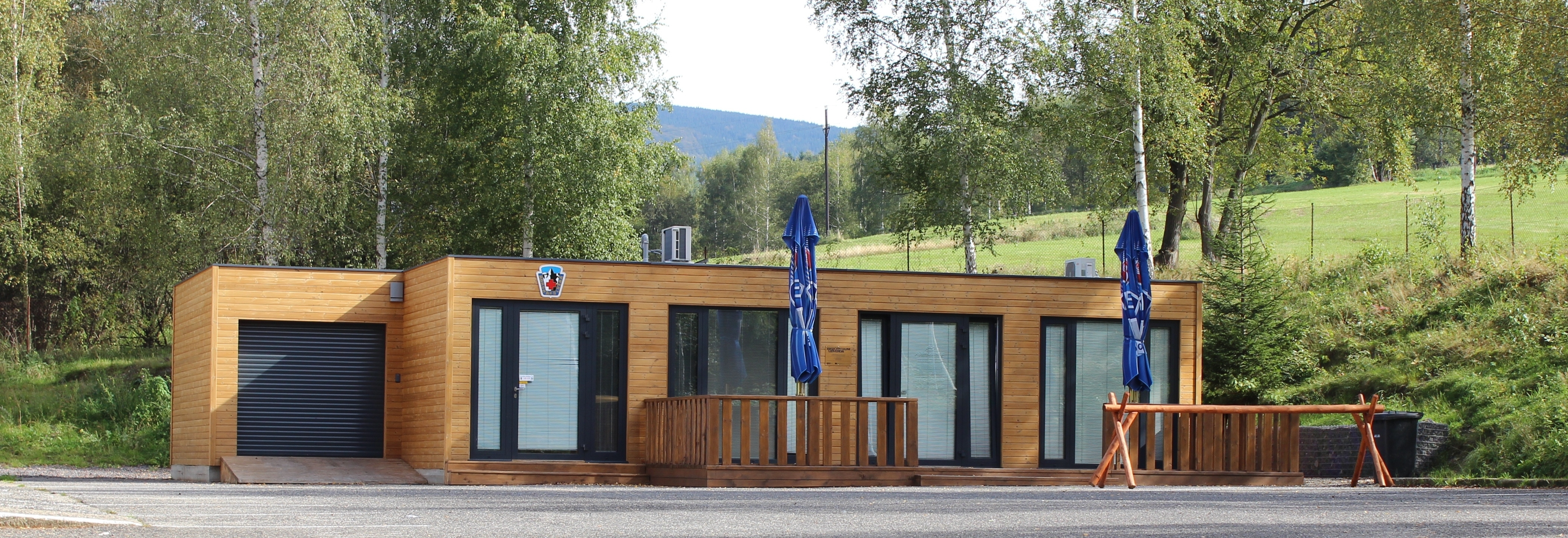 Sídlo horské služby a singltreku Pod Smrkem v Lázních Libverdě.